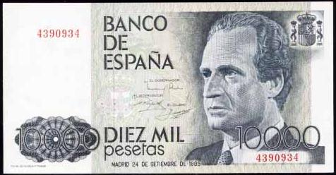 10.000 pesetas del 85.